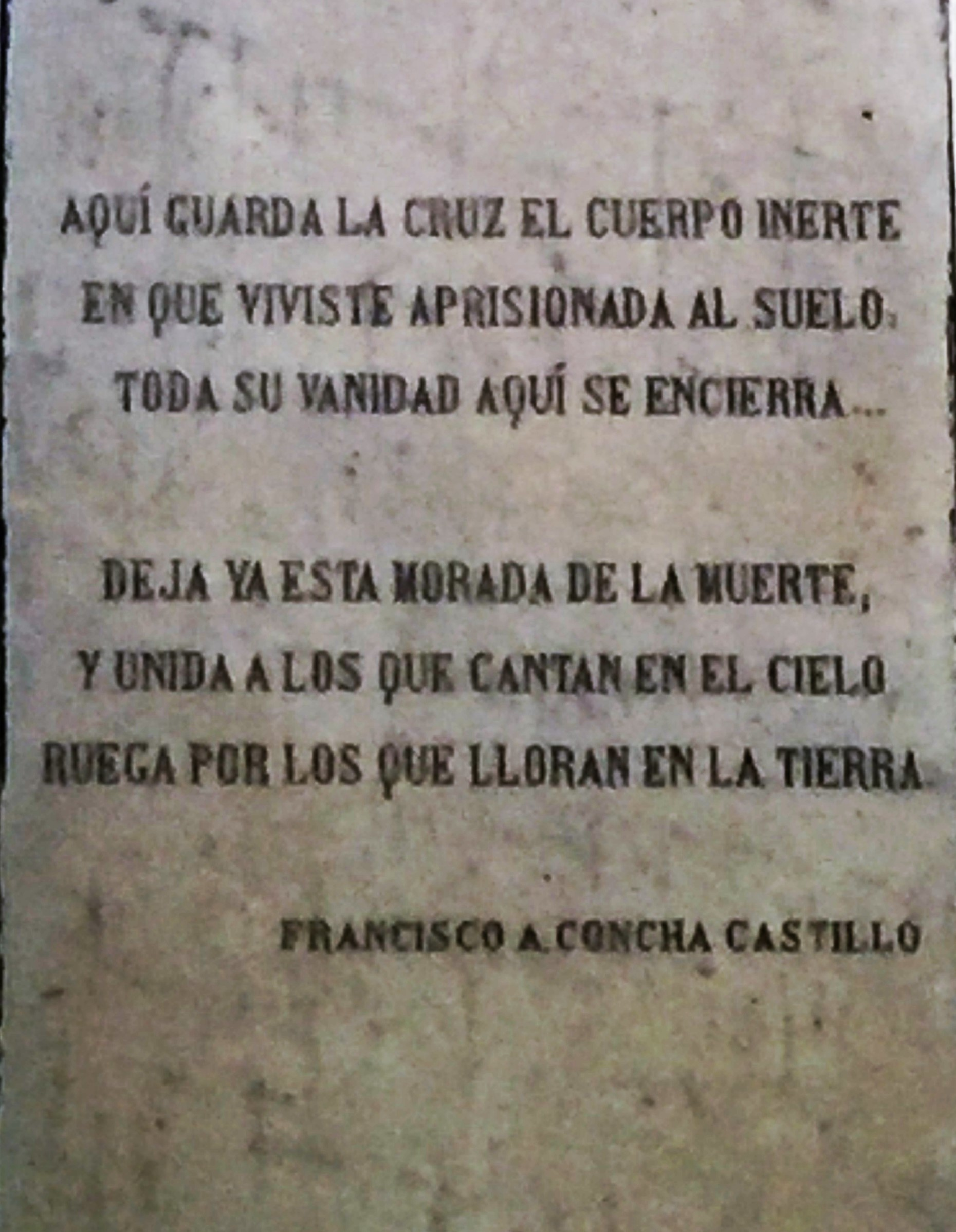 Poesía de Francisco Antonio Concha Castillo (1855-1927)